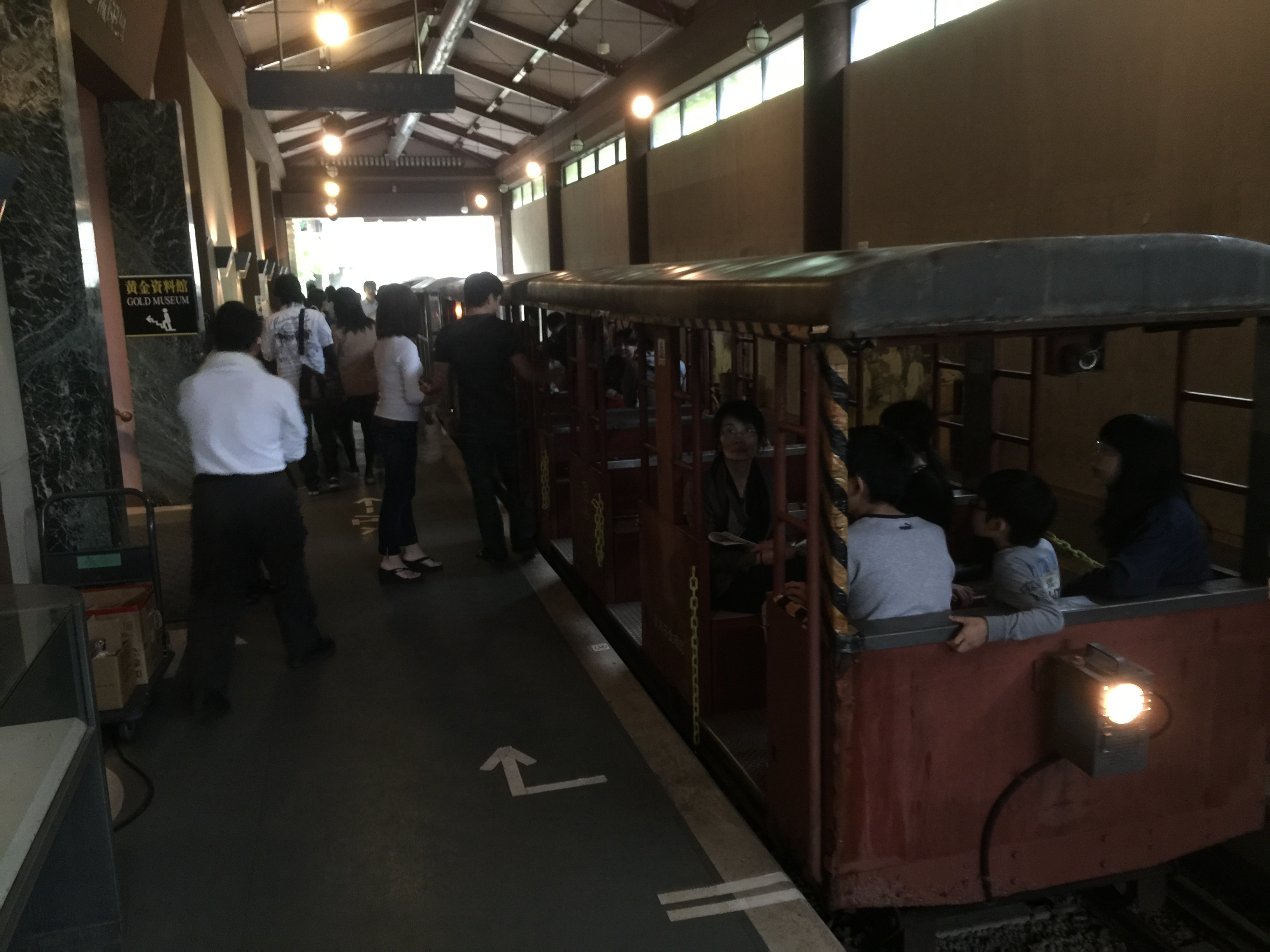 薩摩金山蔵での坑道見学 坑道見学に使用するトロッコ列車